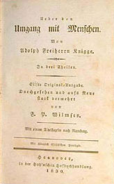 Titelblatt von Knigges Über den Umgang mit Menschen